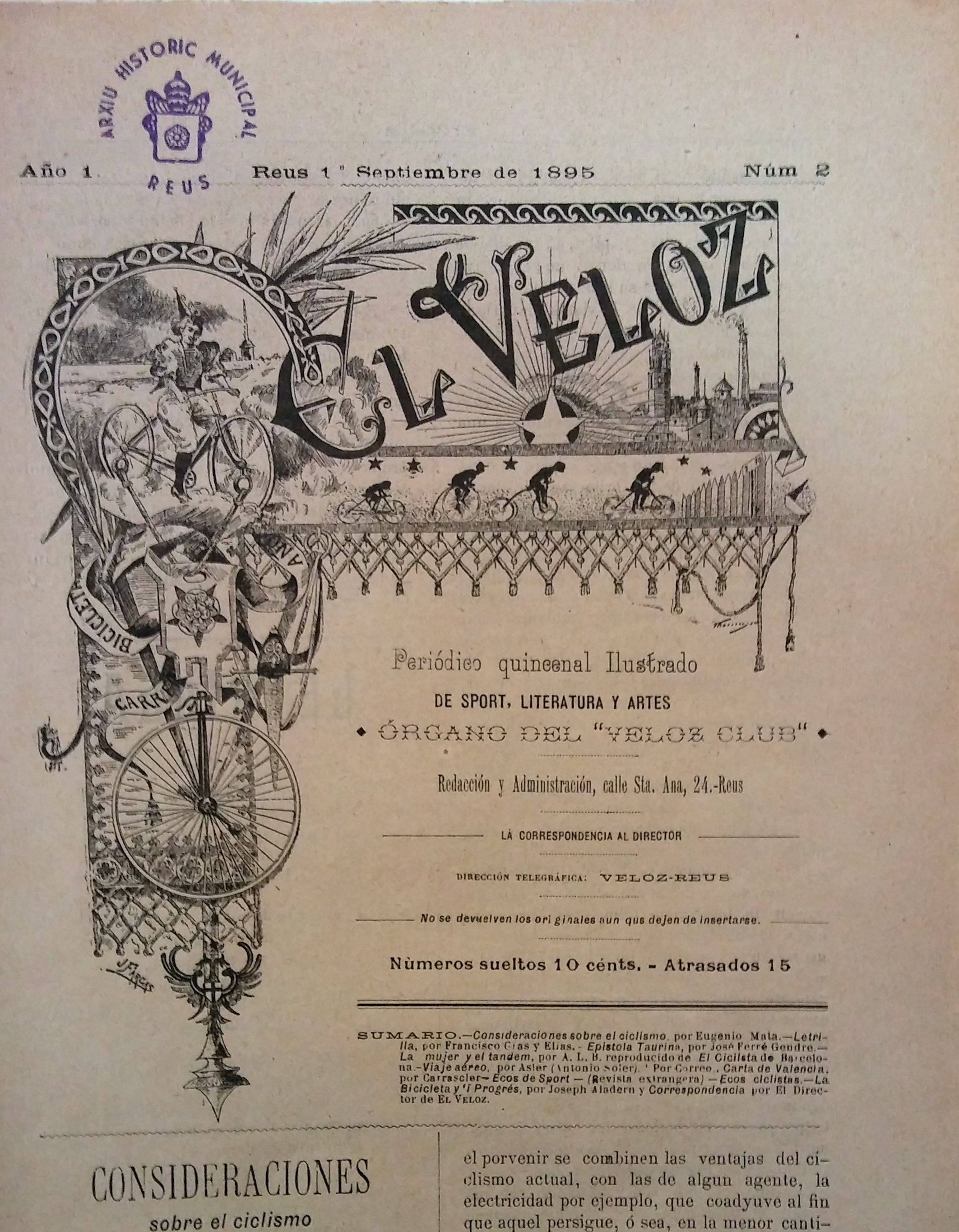 Portada del número 2 de El Veloz